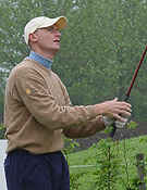 Joost Steenkamer, golfprofessional